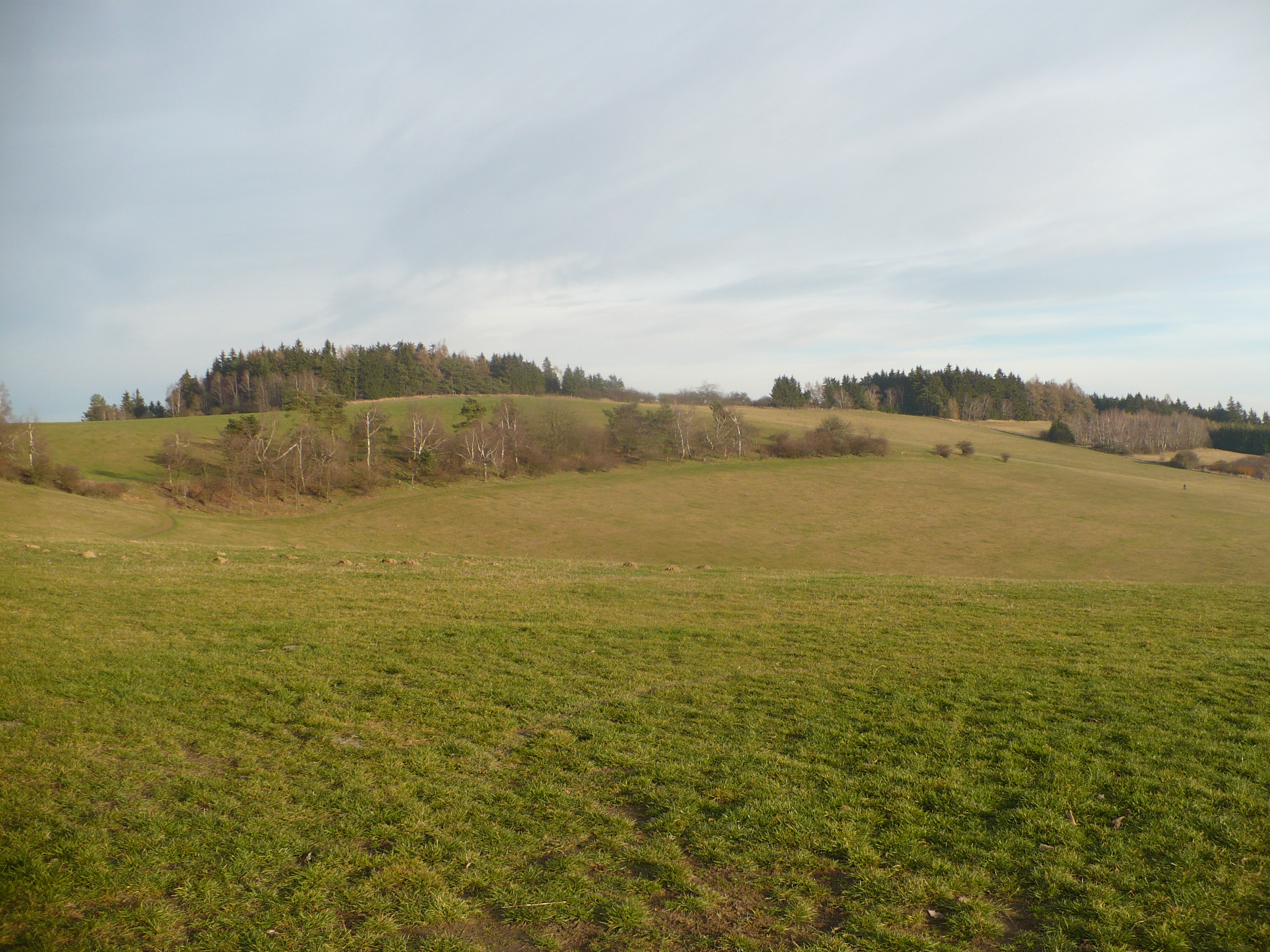 Holý vrch (též Na Nivách) od jihozápadu